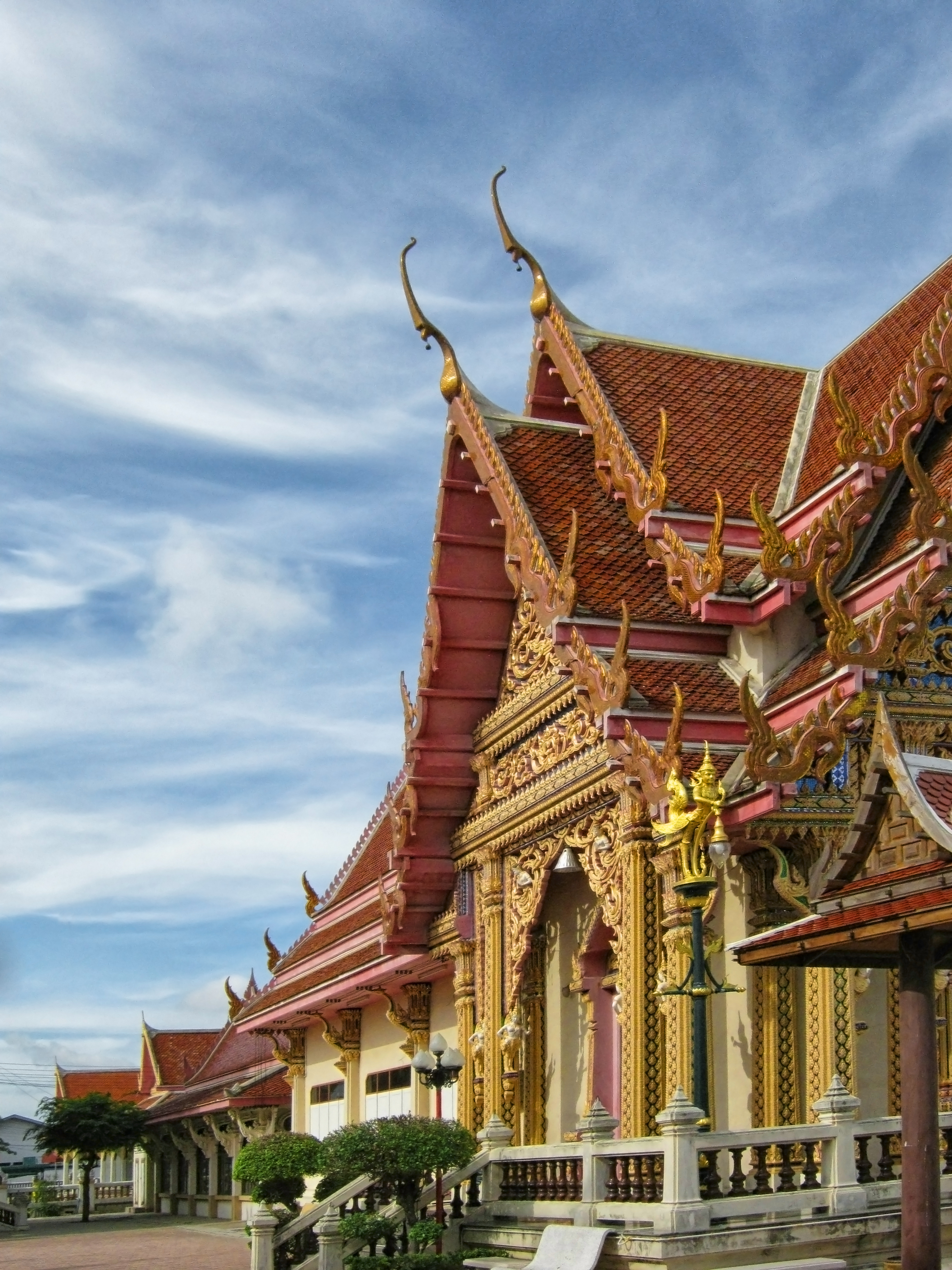 วัดตึกมหาชยาราม